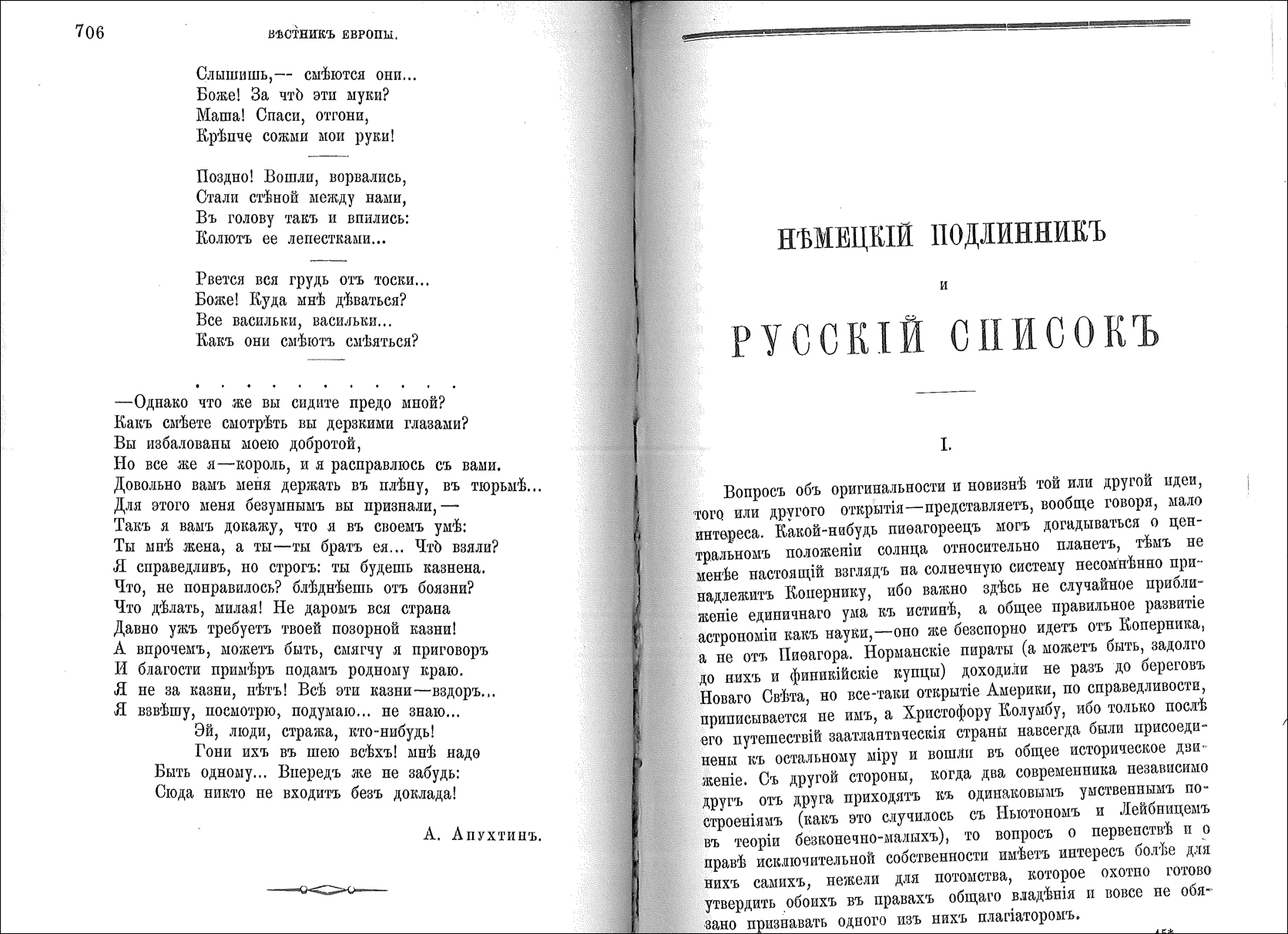 Алексей Апухтин, "Сумасшедший", стихотворение, Вестник Европы, 1890, декабрь, стр. 706, Вл. Соловьёв, "Немецкий подлинник и русский список", стр. 707